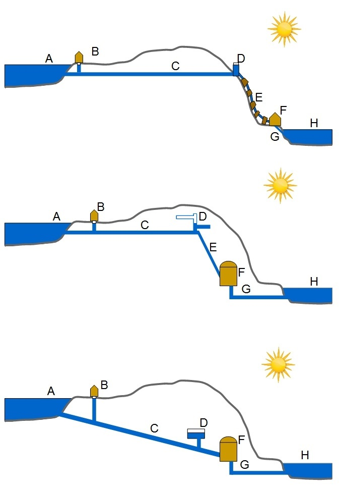 Historical development of water tunnels for hydroelectric power stations in Norway.